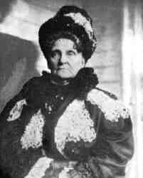 deutsch: Henrietta Howland Robinson Green bzw. "Hetty Green" (1834 - 1916); US-amerikanische Geschäftsfrau english: Henrietta "Hetty" Howland Robinson Green (1834 - 1916); American businesswoman